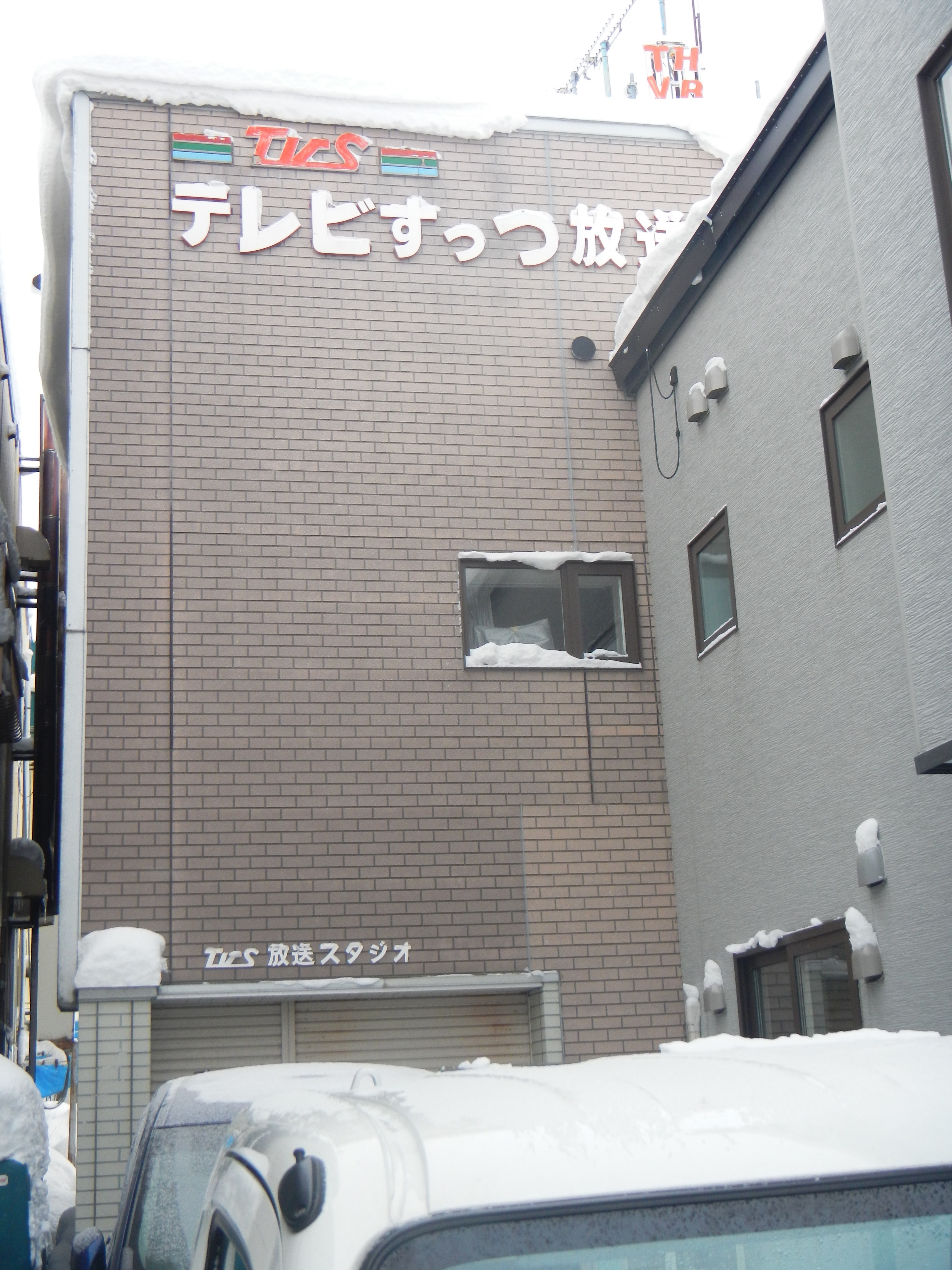 北海道寿都郡寿都町にあるテレビ寿都の本社社屋です。